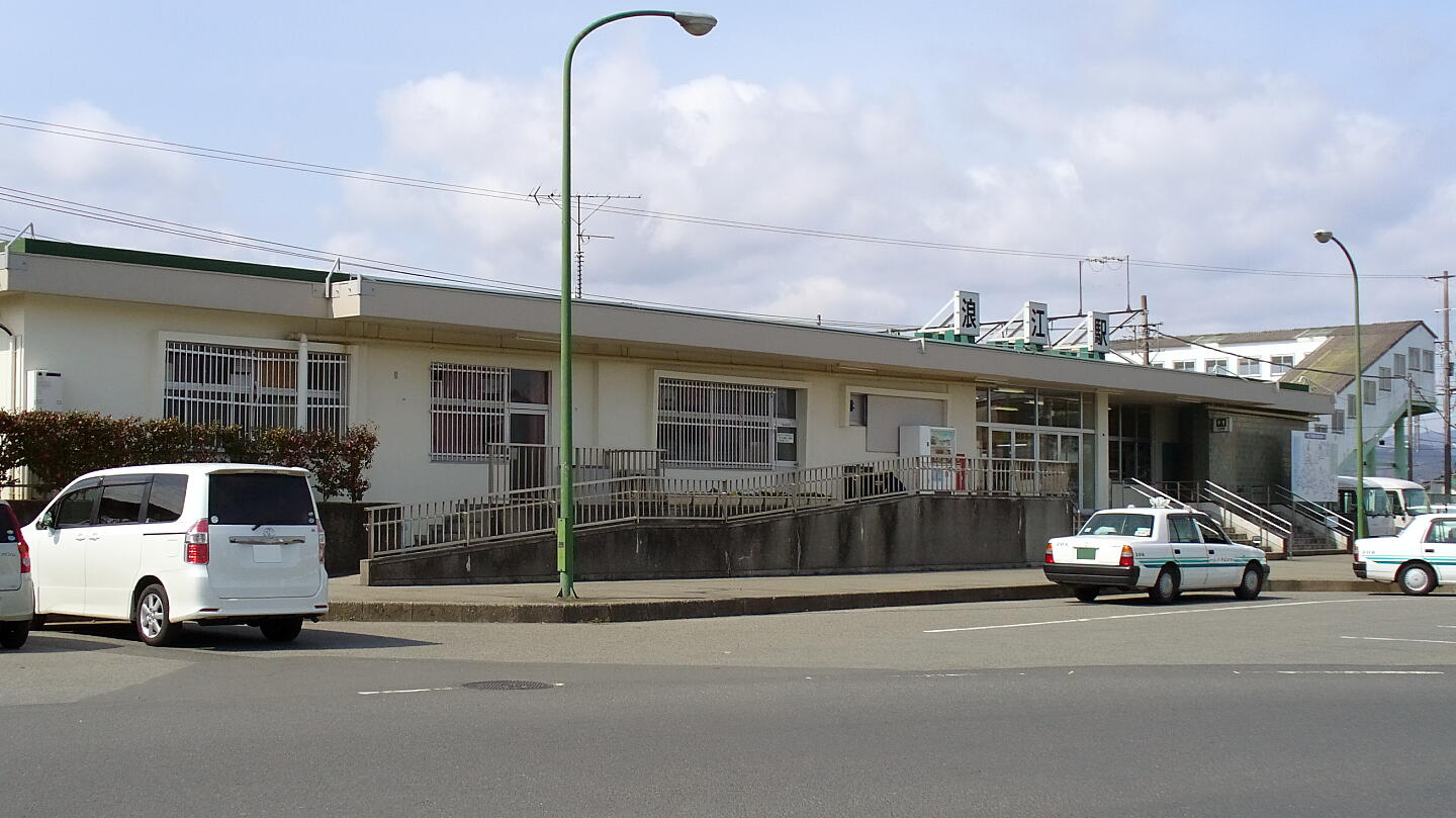 常磐線浪江駅